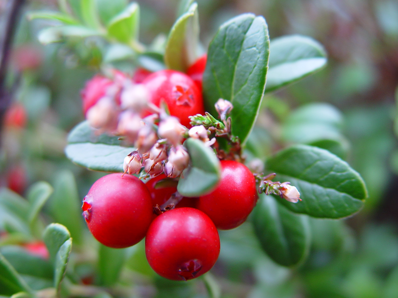 Tyttebær